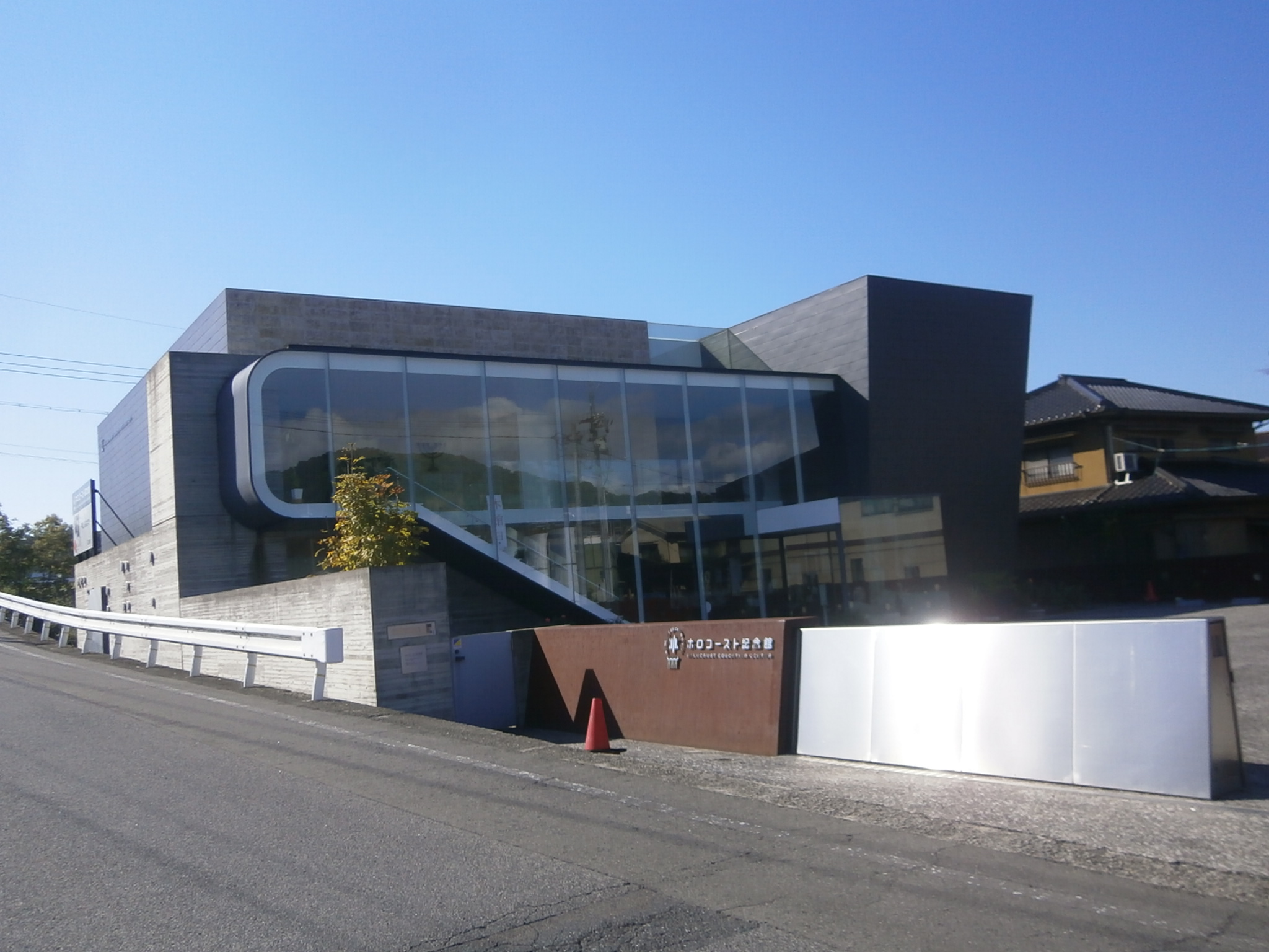 広島県福山市にあるホロコースト記念館の外観画像